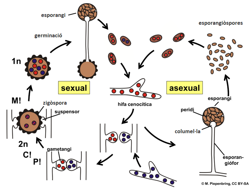 Modificat de File:06_07_life_cycle,_Mucor_sp.,_Mucorales,_Zygomycota_(M._Piepenbring).png